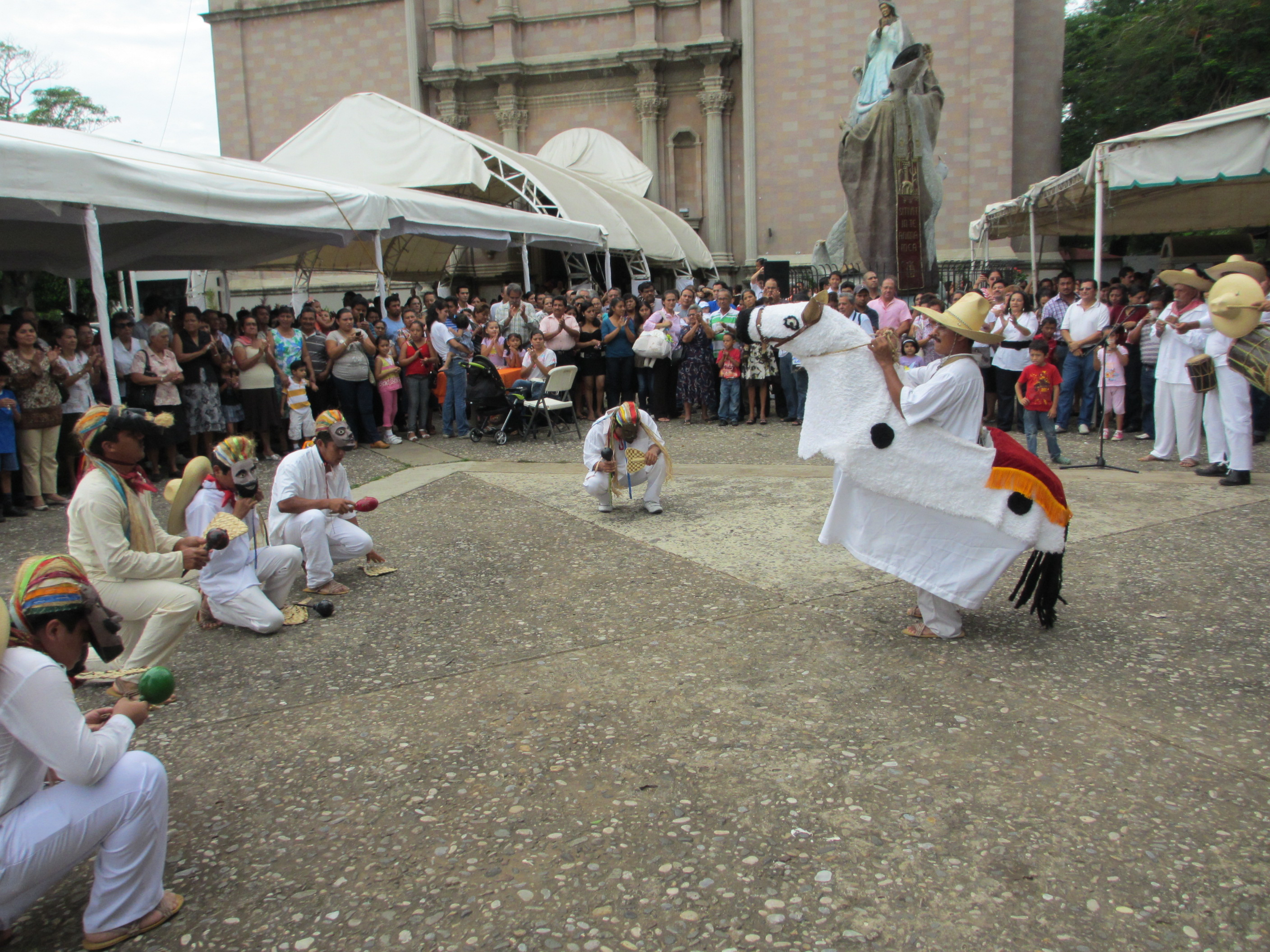 Danzas indígenas en el atrio de la Catedral con motivo del aniversario de la fundación de la ciudad de Villahermosa Tabasco México.